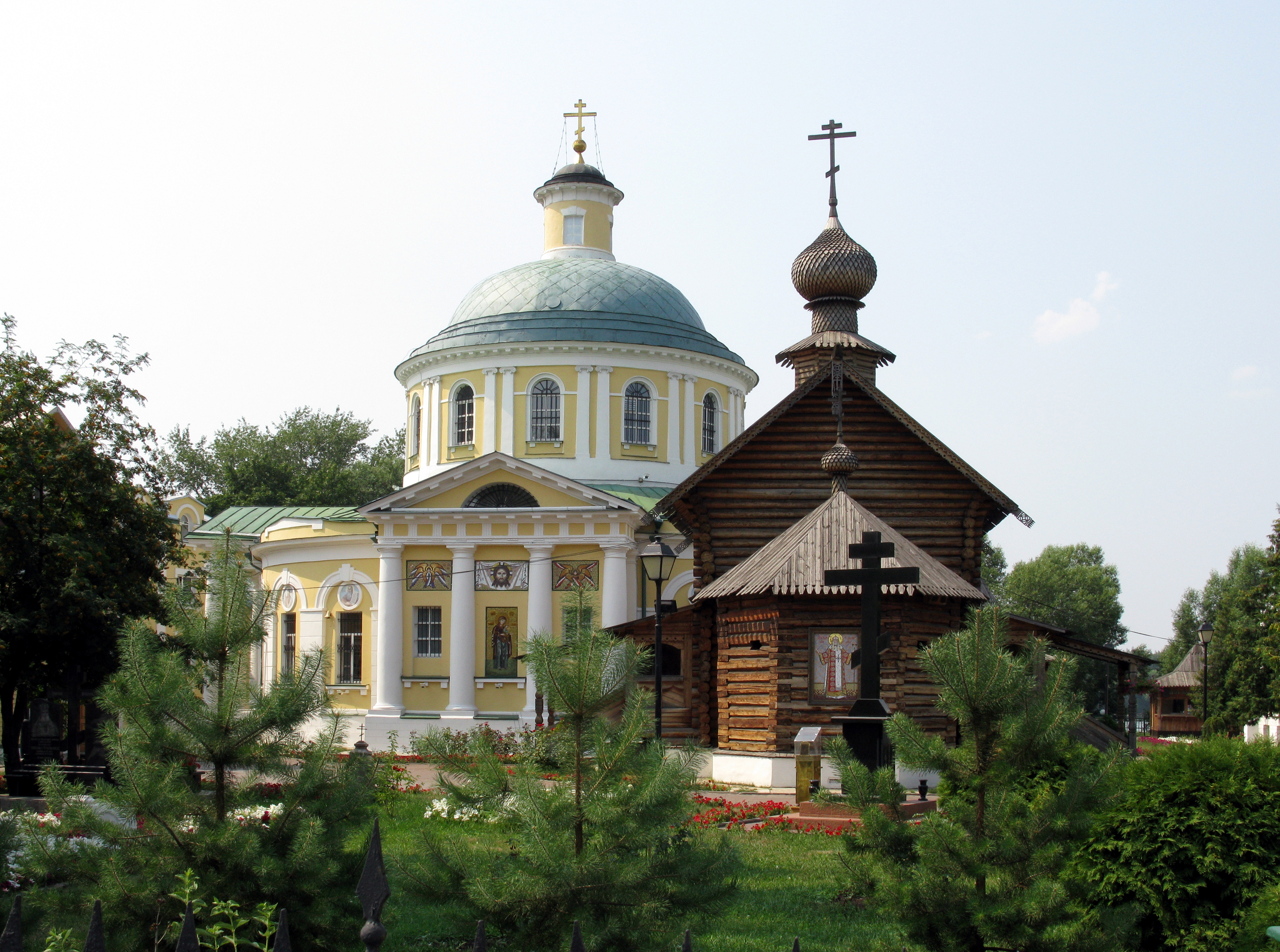 Храмовый комплекс в Косине, Успенский и Тихоновский храмы (Москва, Большая Косинская ул., 29).